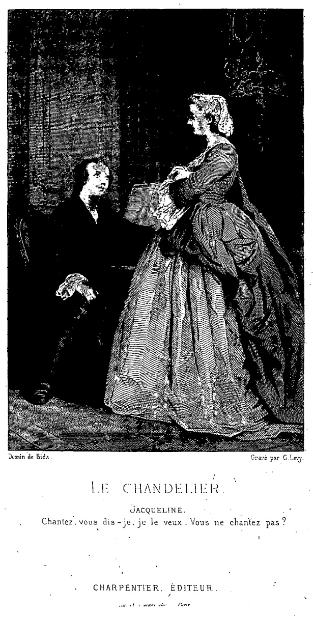 Le Chandelier (Alfred de Musset)